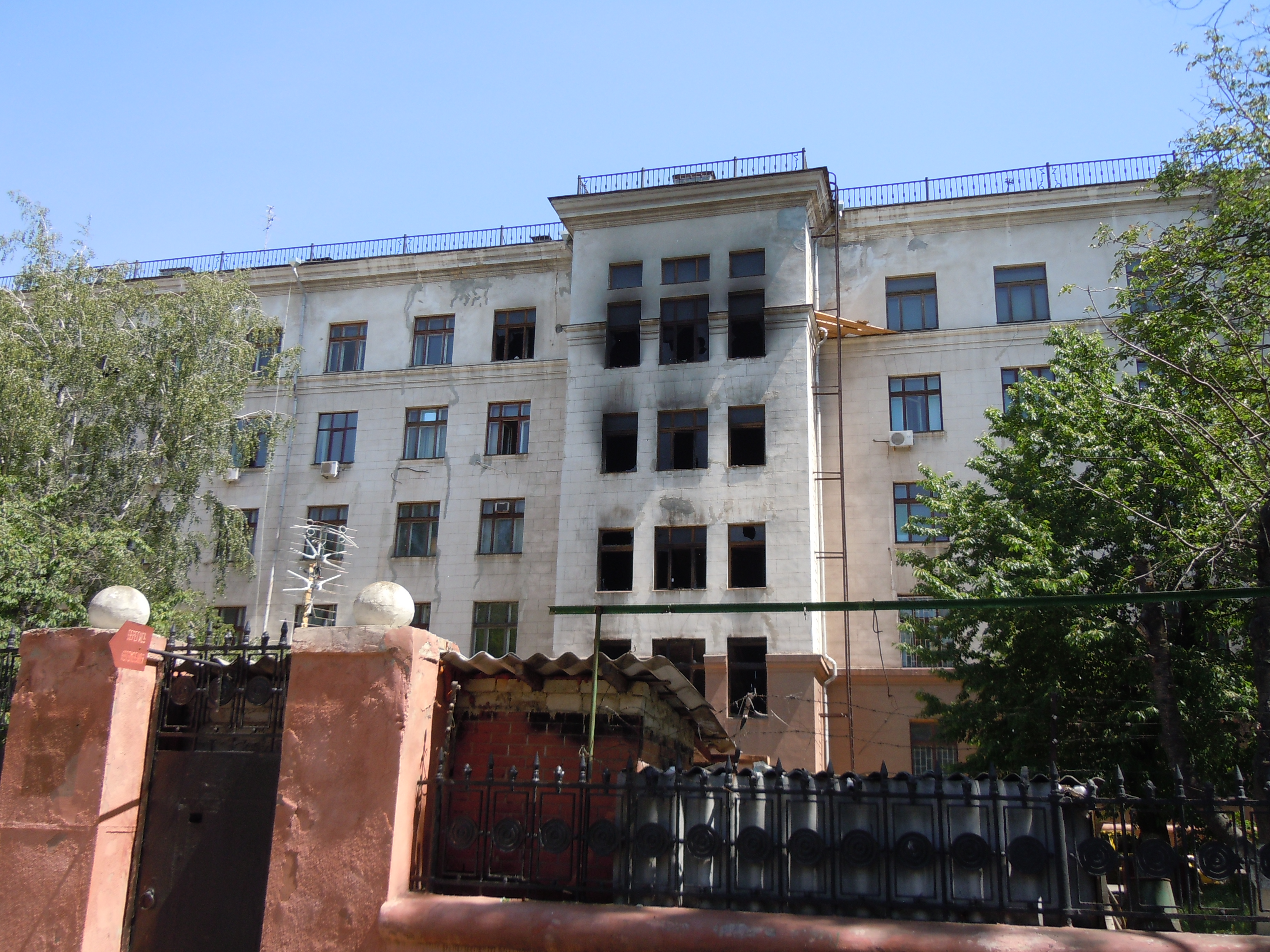 Будинок профспілок Одеської області після пожежі, Одеса, Куликове поле, 1